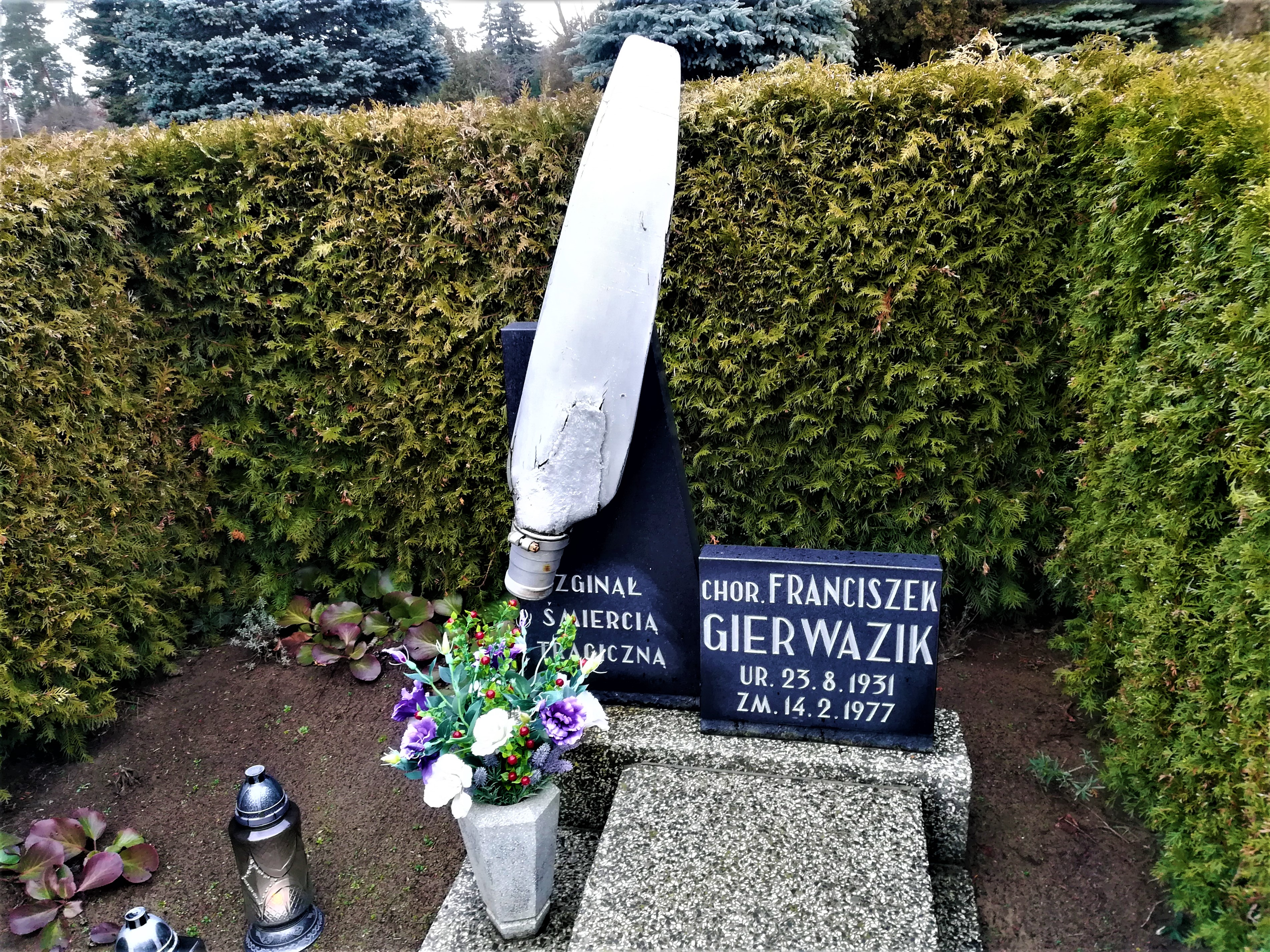 Franciszek Gierwazik, Junikowo Poznań - ofiara katastrofy lotniczej z 1977 r. na Ławicy.